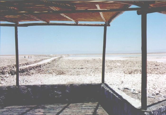 Laguna Chaxa im Salar de Atacama bei Toconao in San Pedro de Atacama